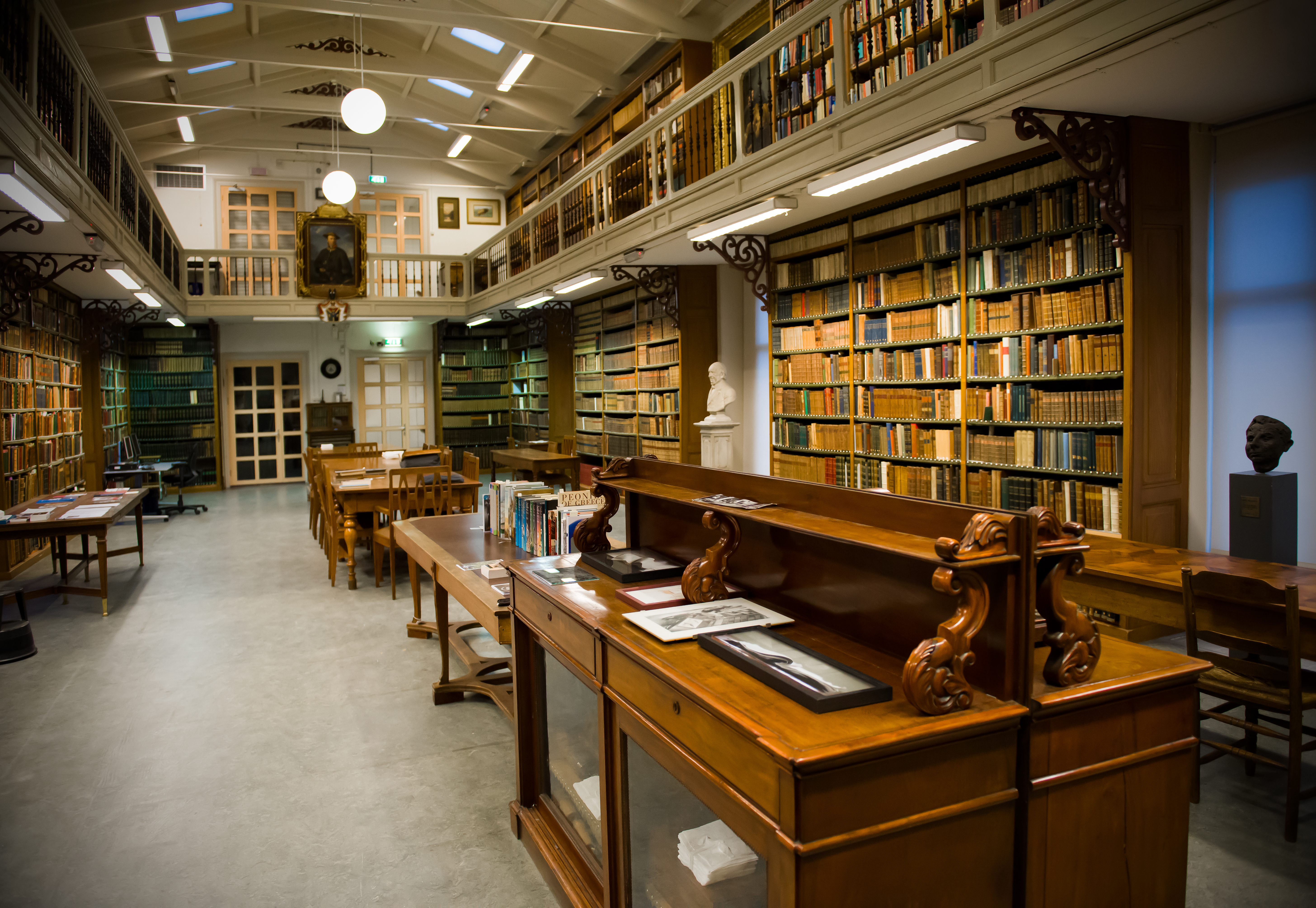 Artis Bibliotheek